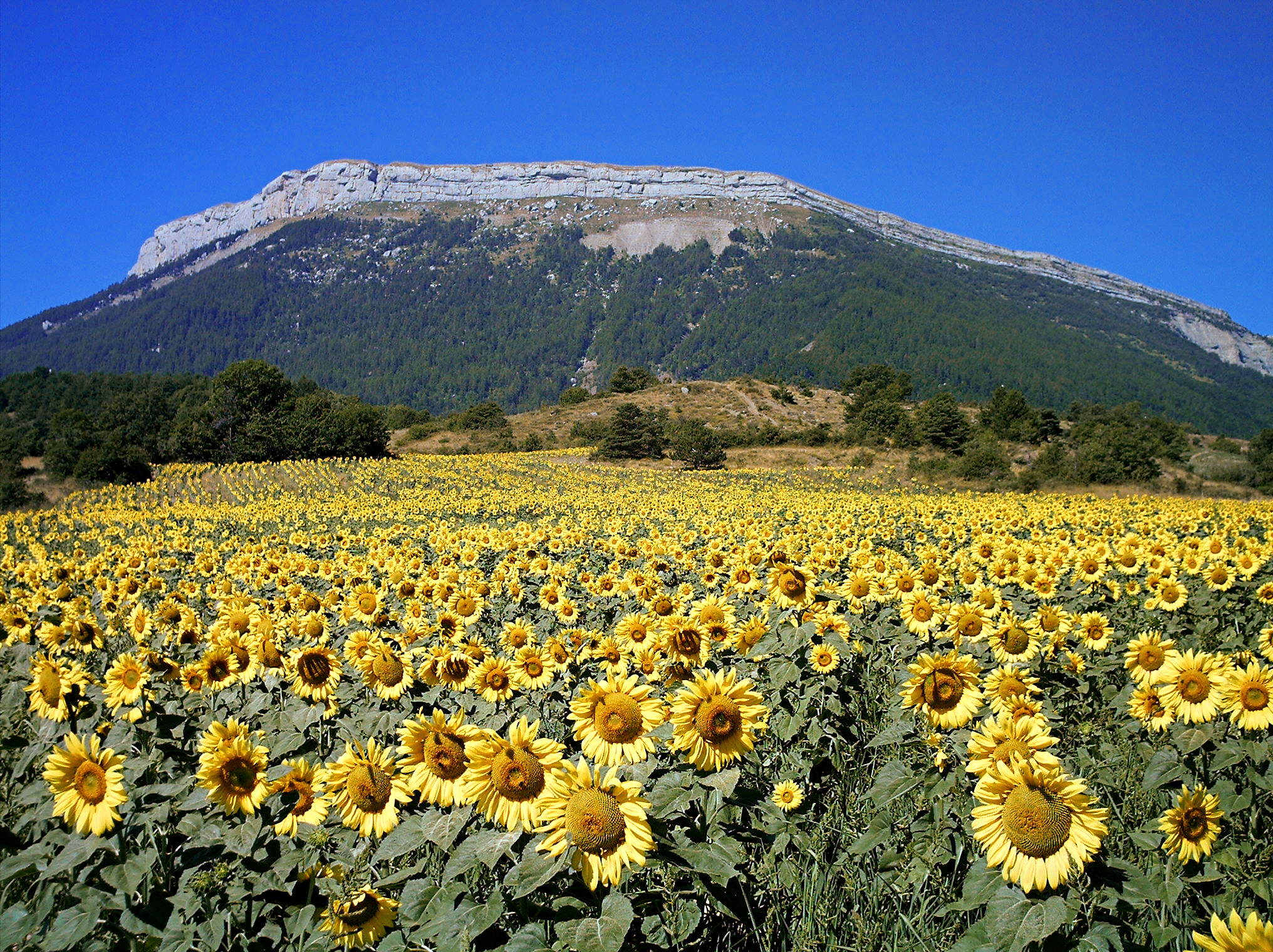 Vue du versant sud-est de la montagne de Ceüse, depuis la commune de La Freissinouse( hameau des Pons).